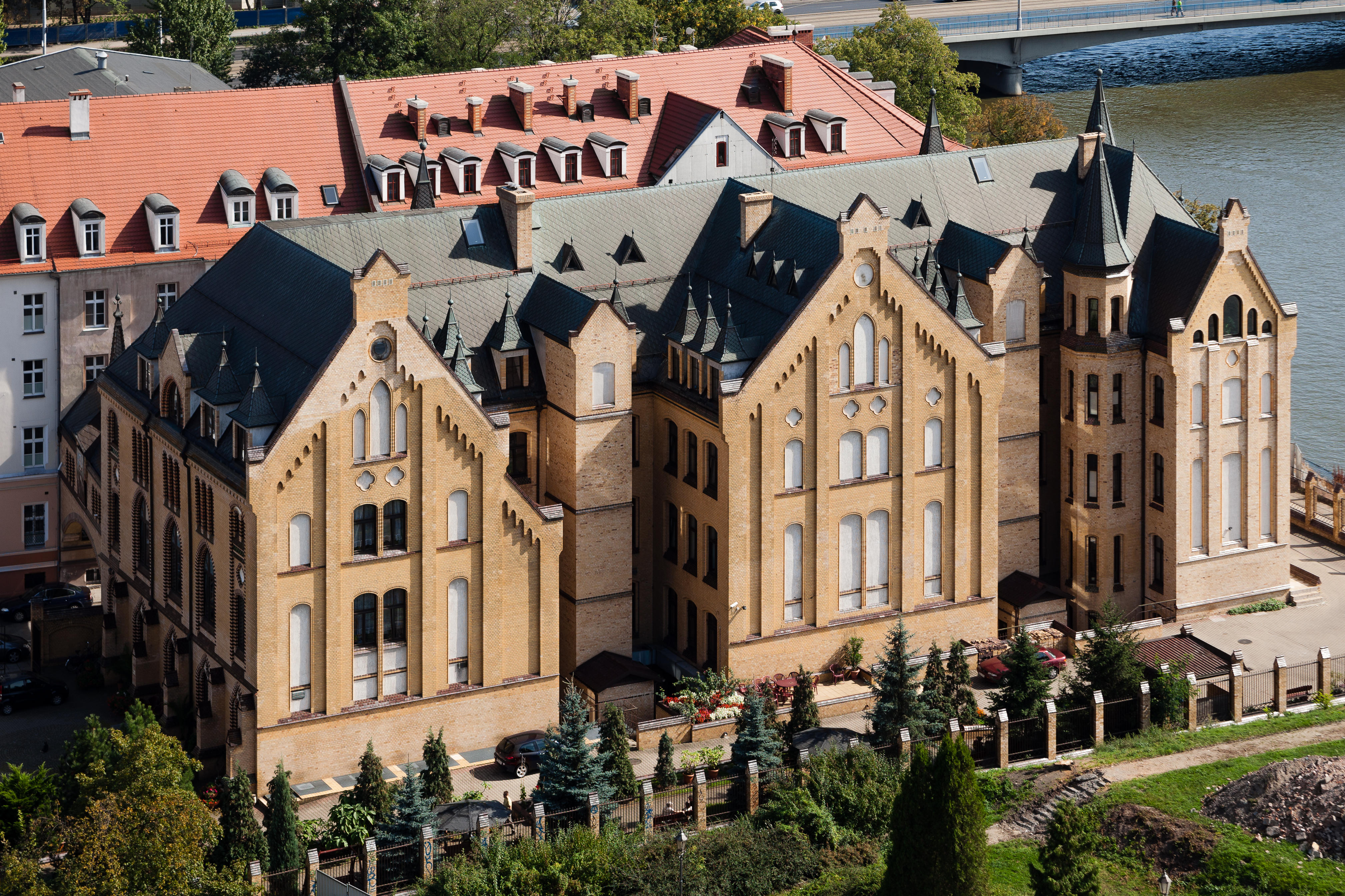 Zespół klasztorny szarych sióstr elżbietanek- budynek nowicjatu